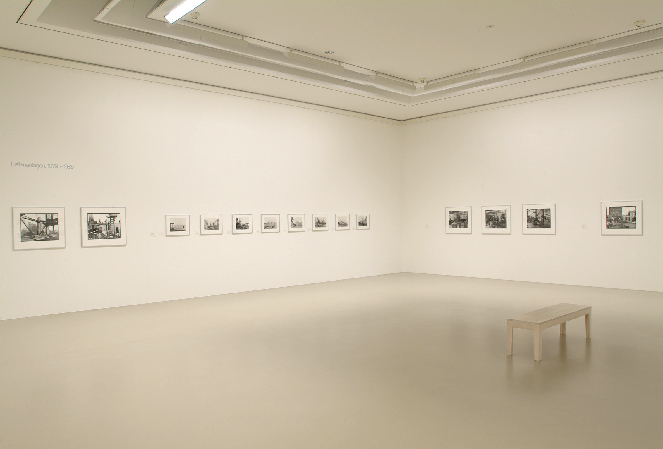 Ausstellung Heinrich Riebesehl. Fotografische Serien 1963 – 2001 im Sprengel Museum Hannover, 6. Juni – 17. Oktober 2004.